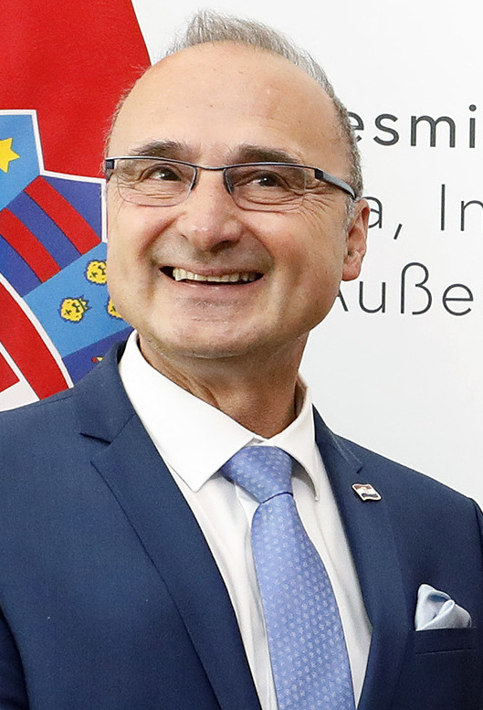 Bundesminister Alexander Schallenberg trifft den kroatischen Außenminister Gordan Grlic Radman, Wien. 13.09.2019, Foto: Dragan Tatic